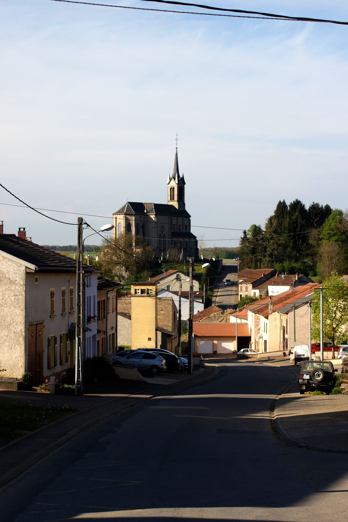 Rue Saint-Éloi, Flastroff, Moselle, France